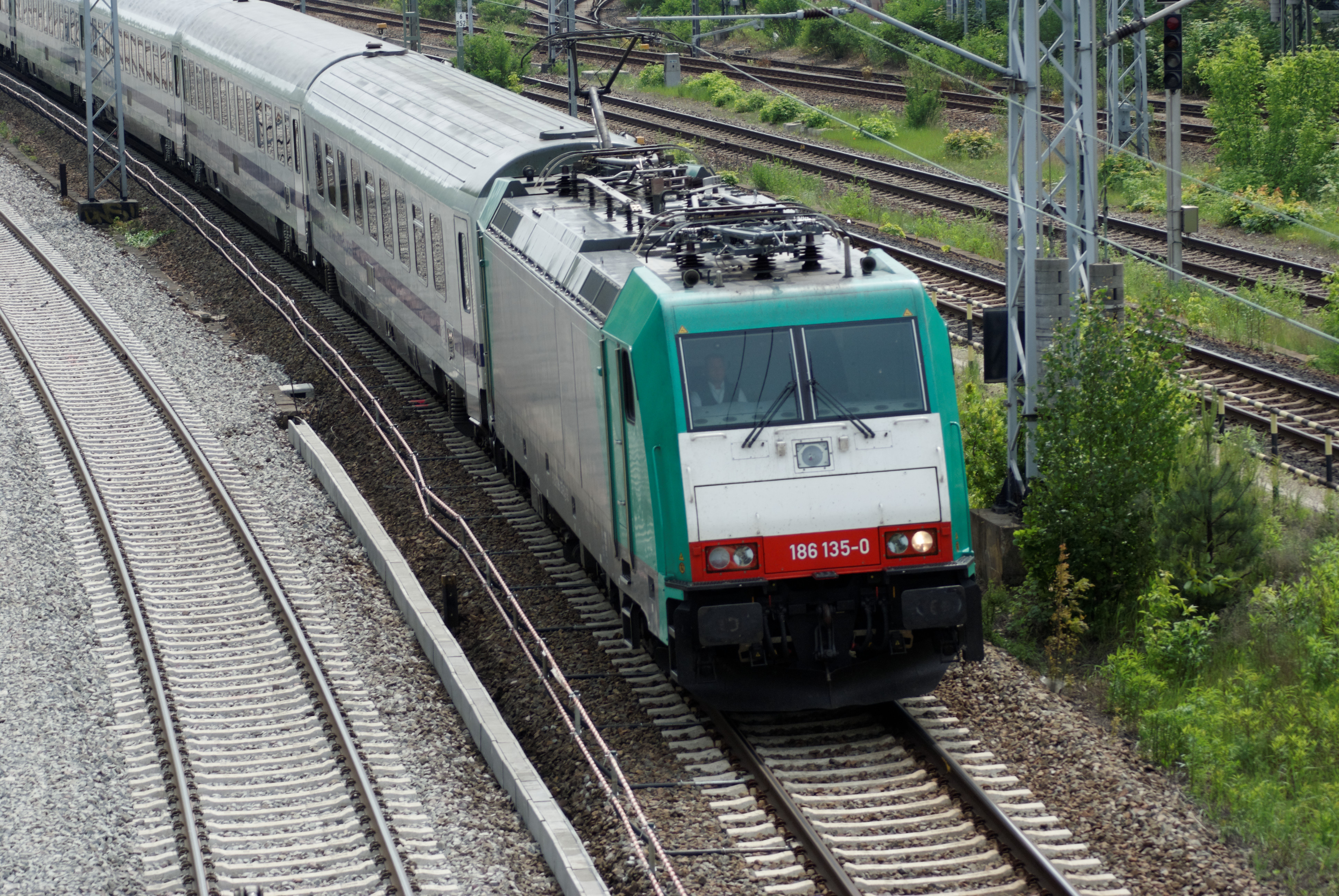 Berlin-Warschau-Express